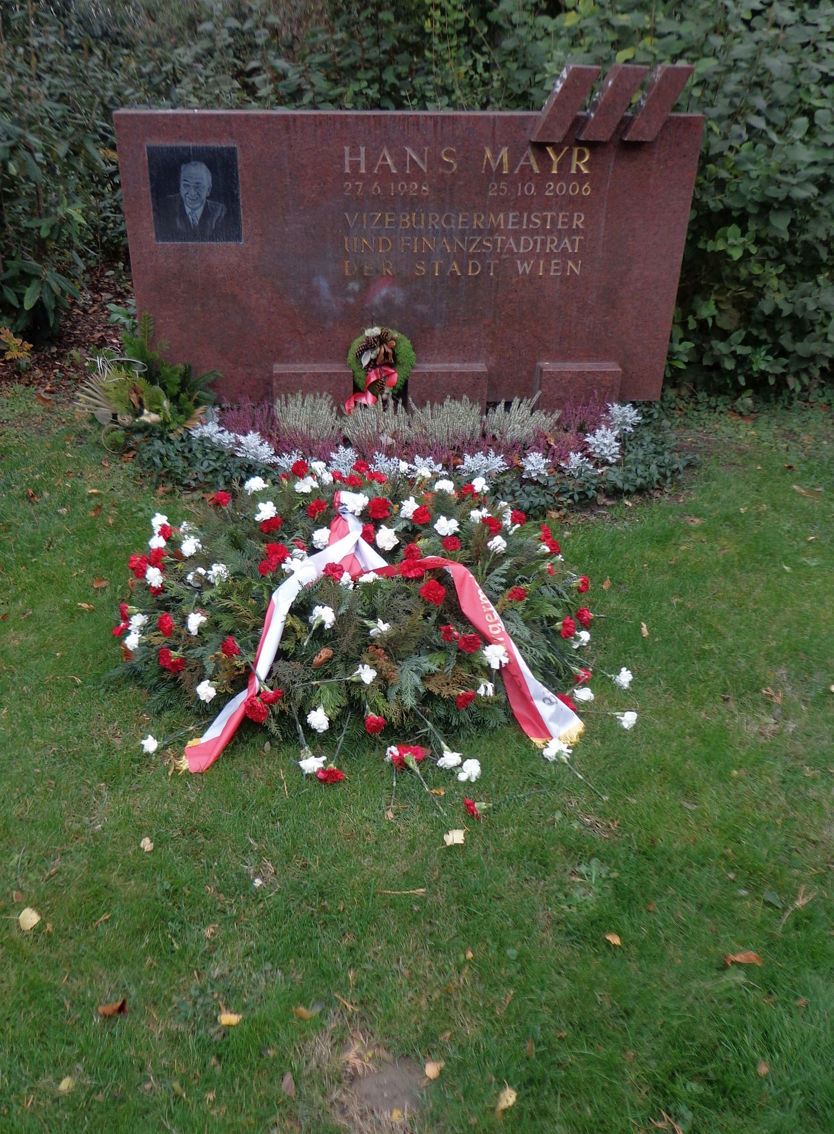 Wiener Zentralfriedhof - Gruppe 32 C, Ehrengrab von Hans Mayr, Vizebürgermeister von Wien